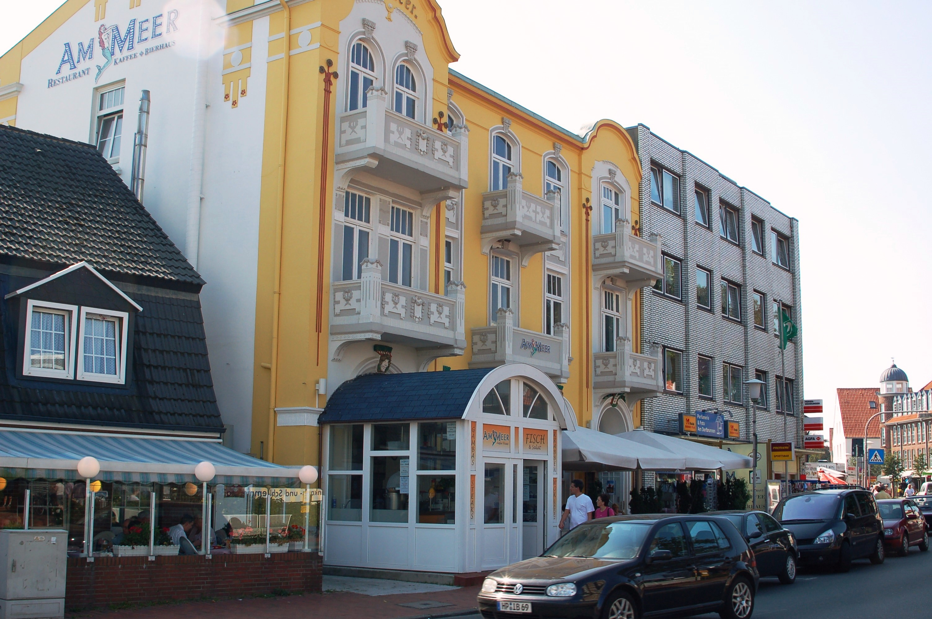 Holel "am Meer"